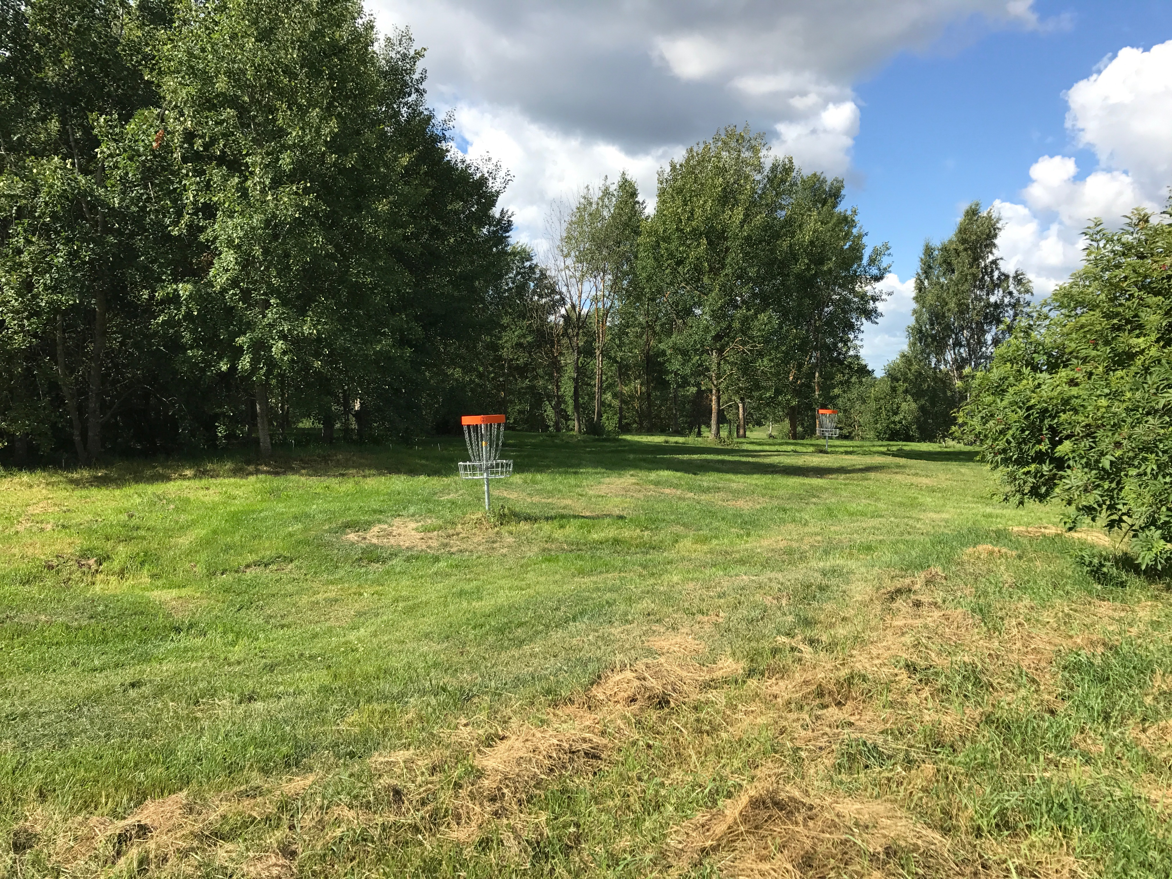 Talin frisbeegolfpuisto Talinhuipulla